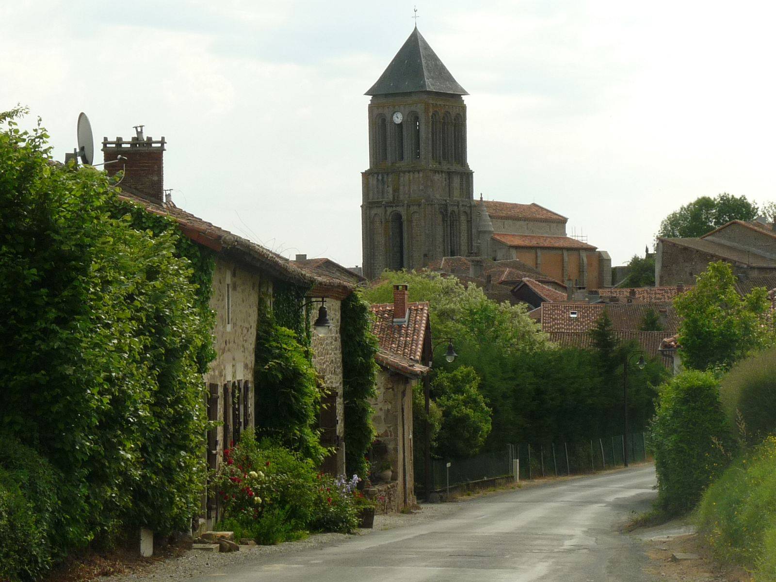 rue de Lesterps, Charente, France